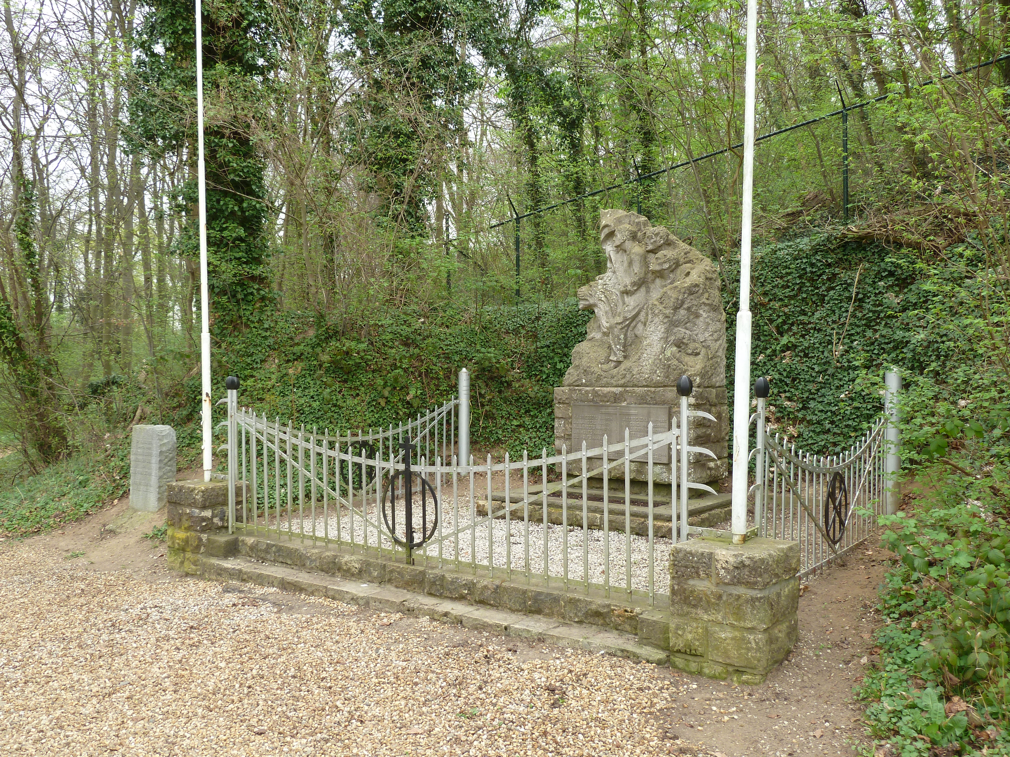 Vlaams + Belgisch monument, Cadier en Keer, Limburg, Nederland